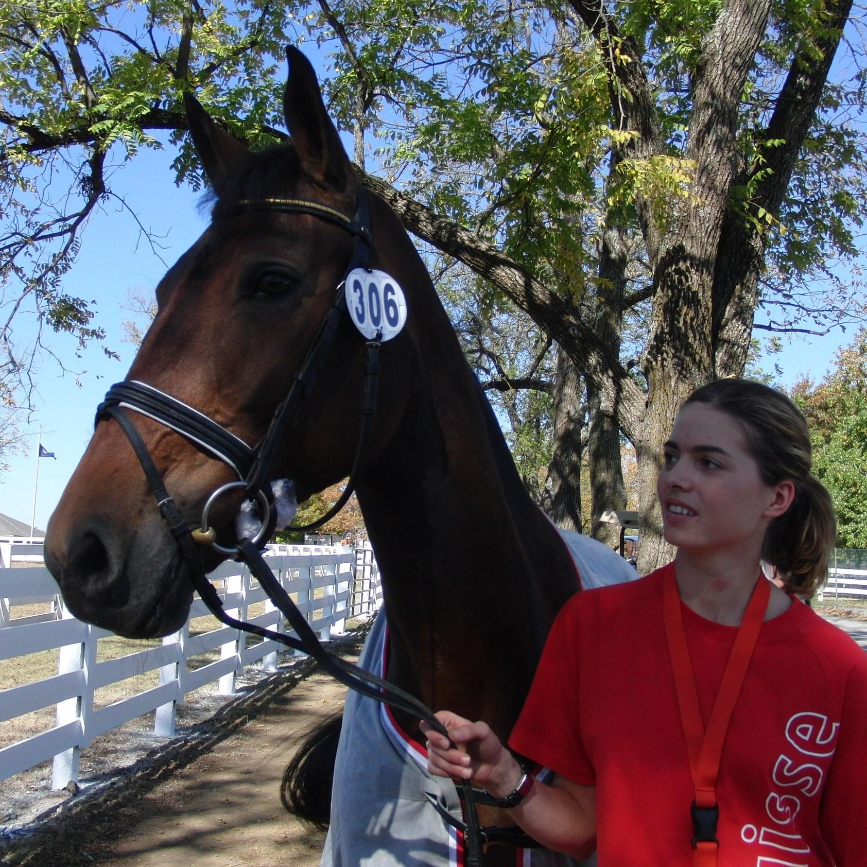 Celine van Till met Tin Tin G op Wereldruiterspelen 2010 in Kentucky